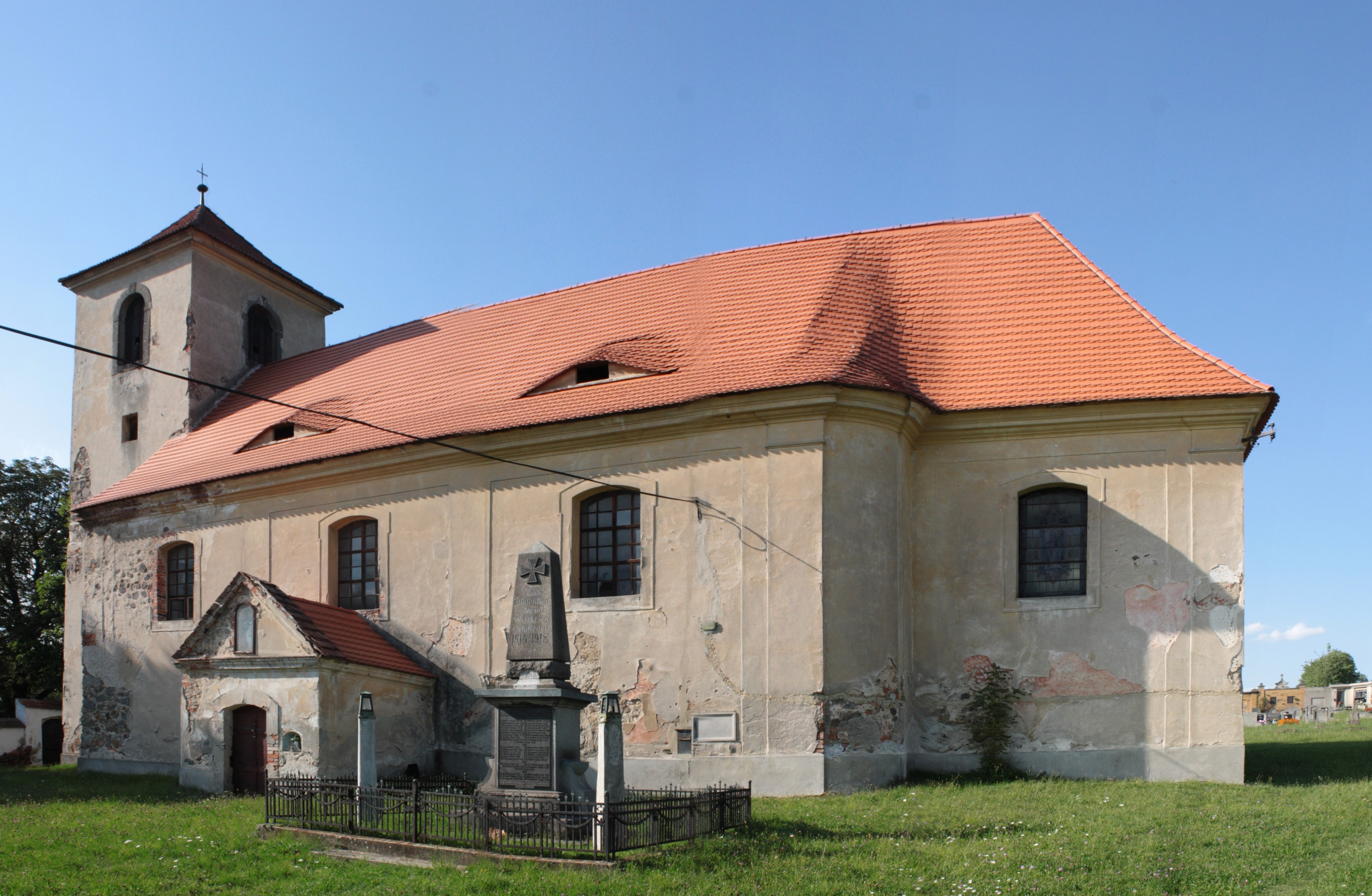 This photograph was taken with a DSLR from WMCZ's Camera grant. Kostel svatého Jošta v Dolních Pertolticích (pohled od jihovýchodu).